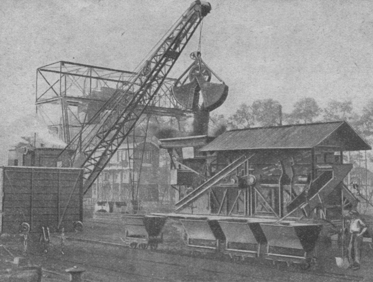 Crible mécanique à combustibles du dépôt de Laroche - Vue du crible (Photo Georgeon, Migennes) - Le charbon criblé est reçu dans des wagonnets Decauville à voies de 0,50 m, lesquels sont acheminés rapidement au lieu de déversement dans les tenders (Bulletin PLM n°7 de janvier 1930)